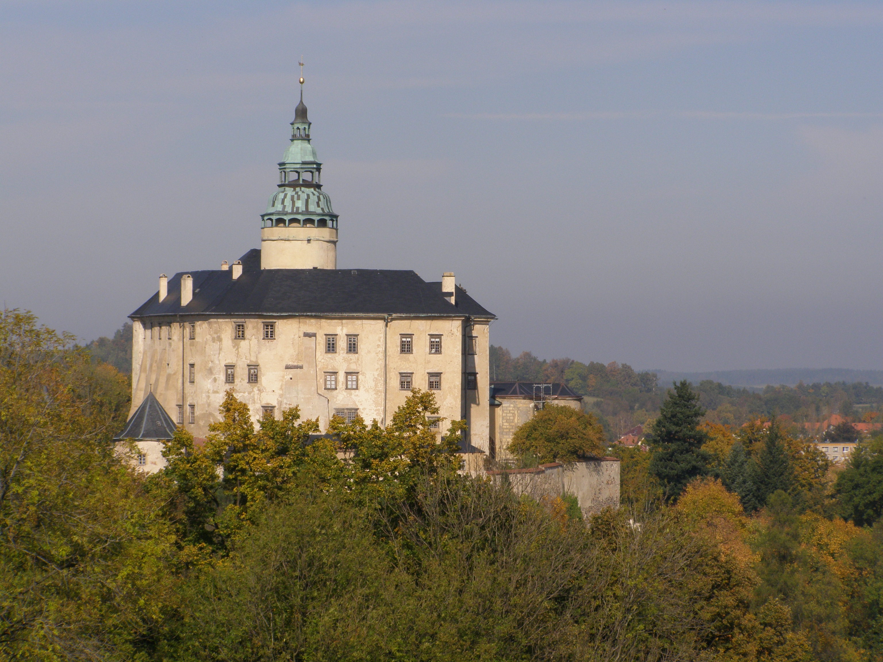 Frýdlant, pohled z lokality Hág na zámek